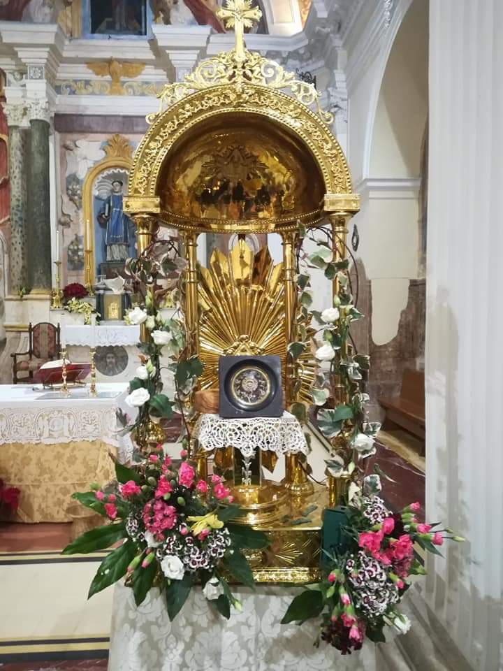 Reliquia di Sant'Antonio Abate a Colli a Volturno